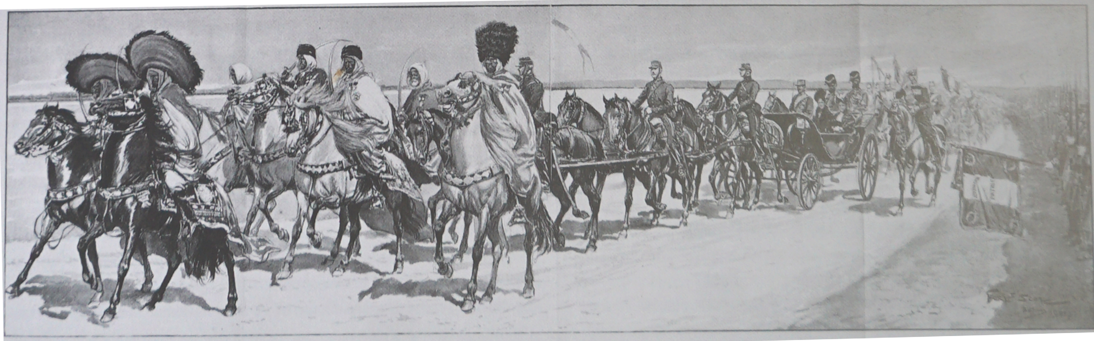 1901 le cortège impérial in l'illustration à Bétheny et les cheiks arabes passant devant la tribune.